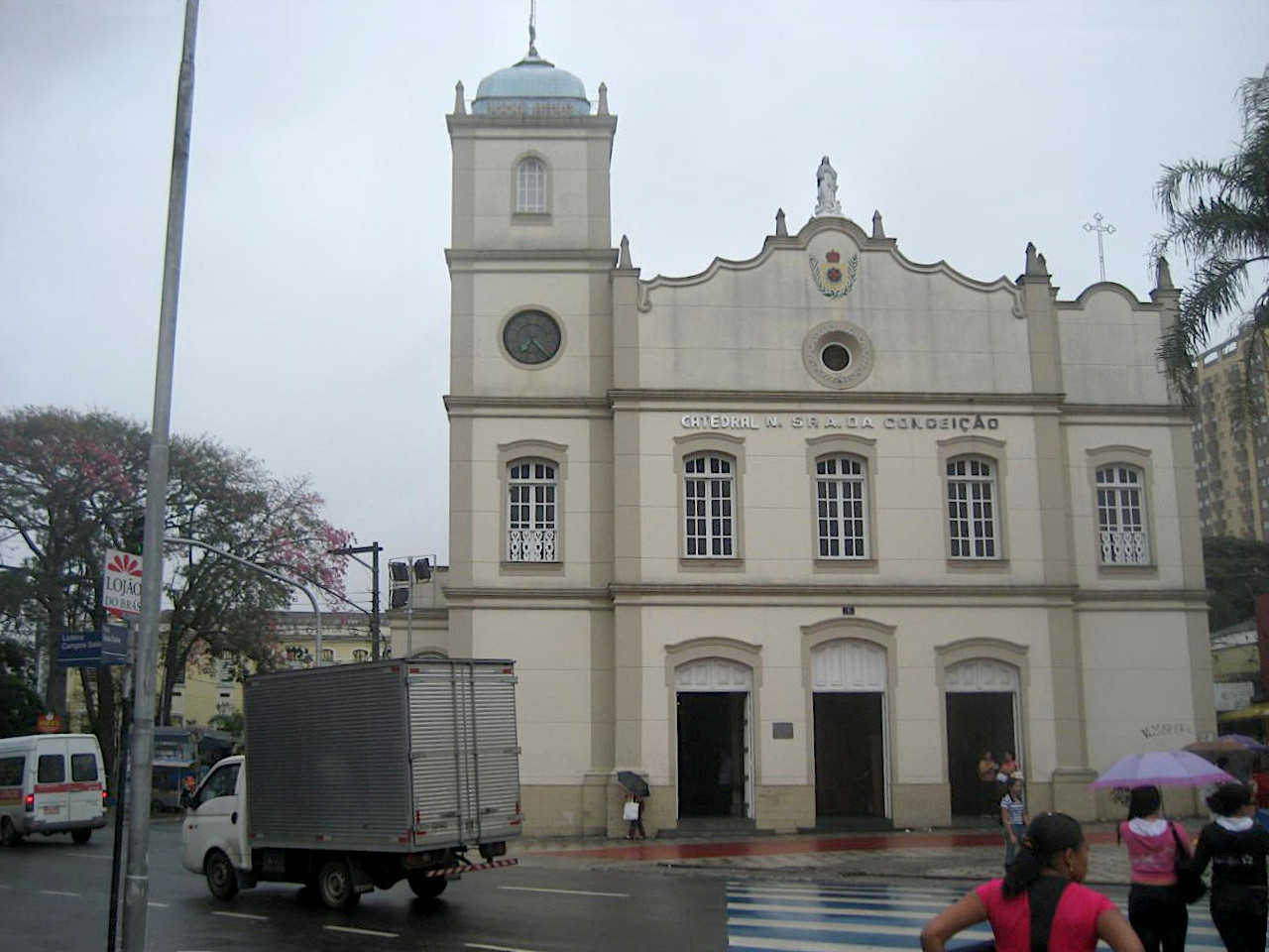 Guarulhos Church